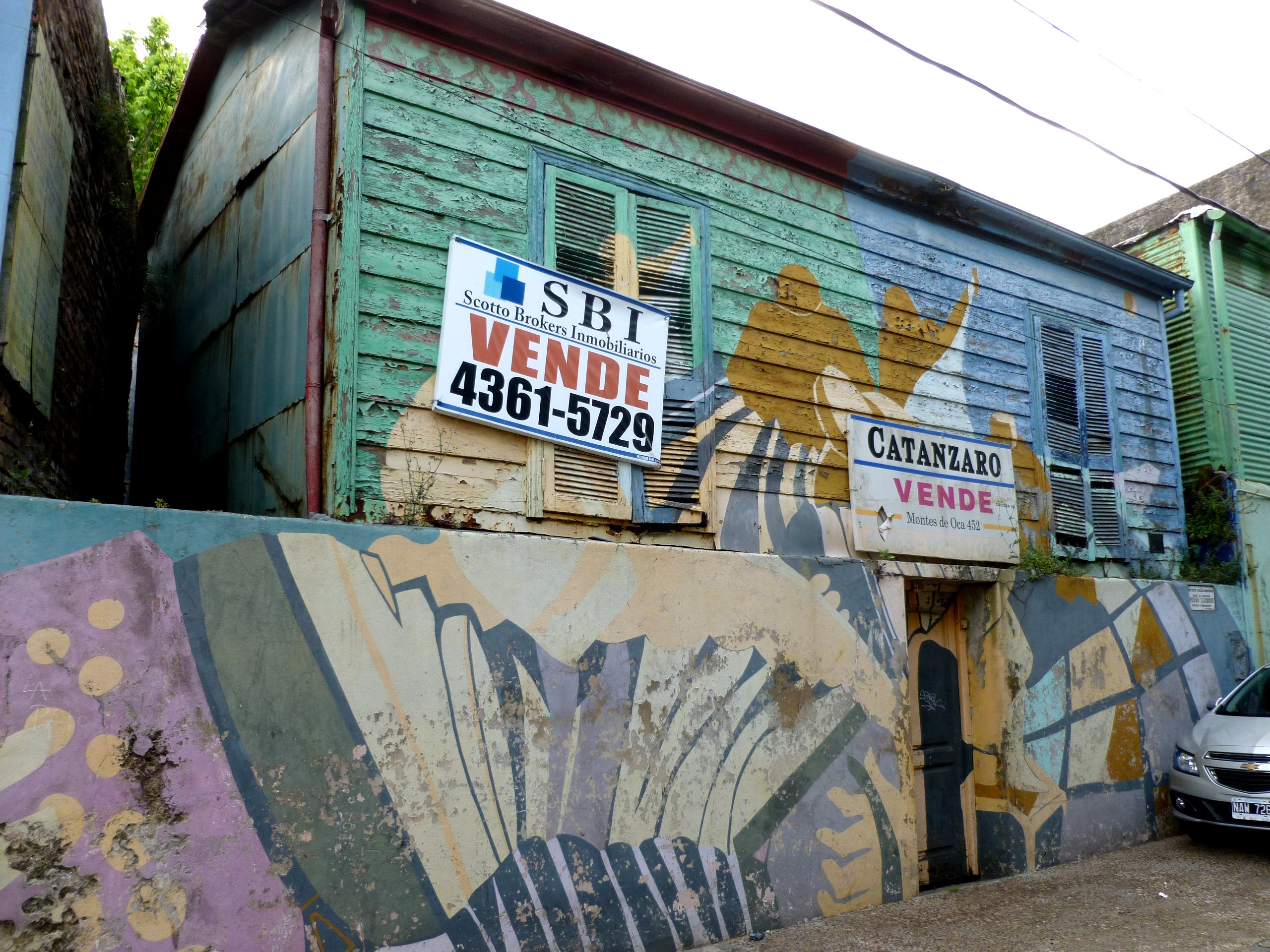 Pedro Laurenz's born house. Garibaldi St. between Olavarría and Lamadrid, La Boca, Buenos Aires. Casa donde nació Pedro Laurenz, Garibaldi entre Olavarría y Lamadrid, La Boca, Buenos Aires